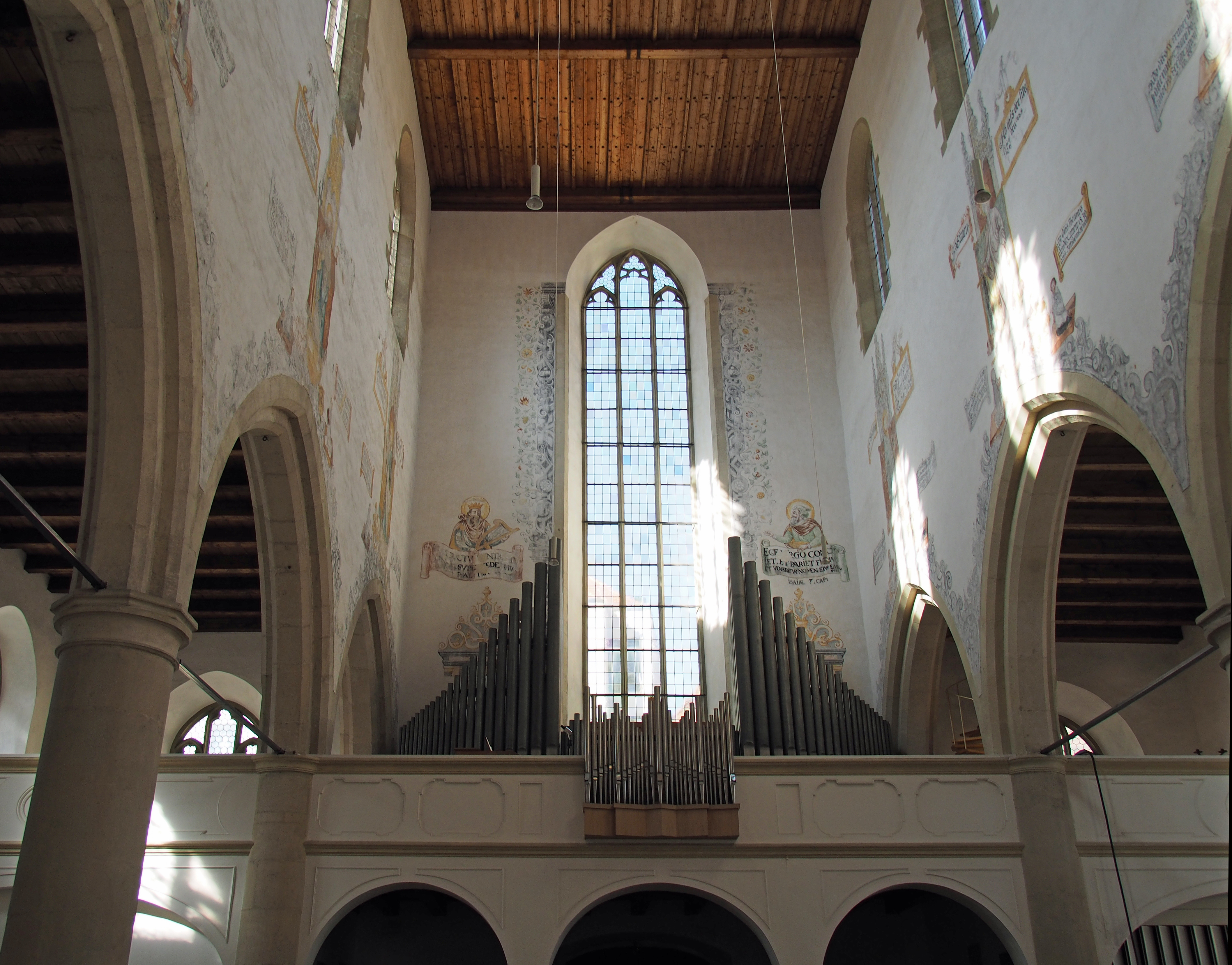 Orgelempore in der Minoritenkirche in Regensburg